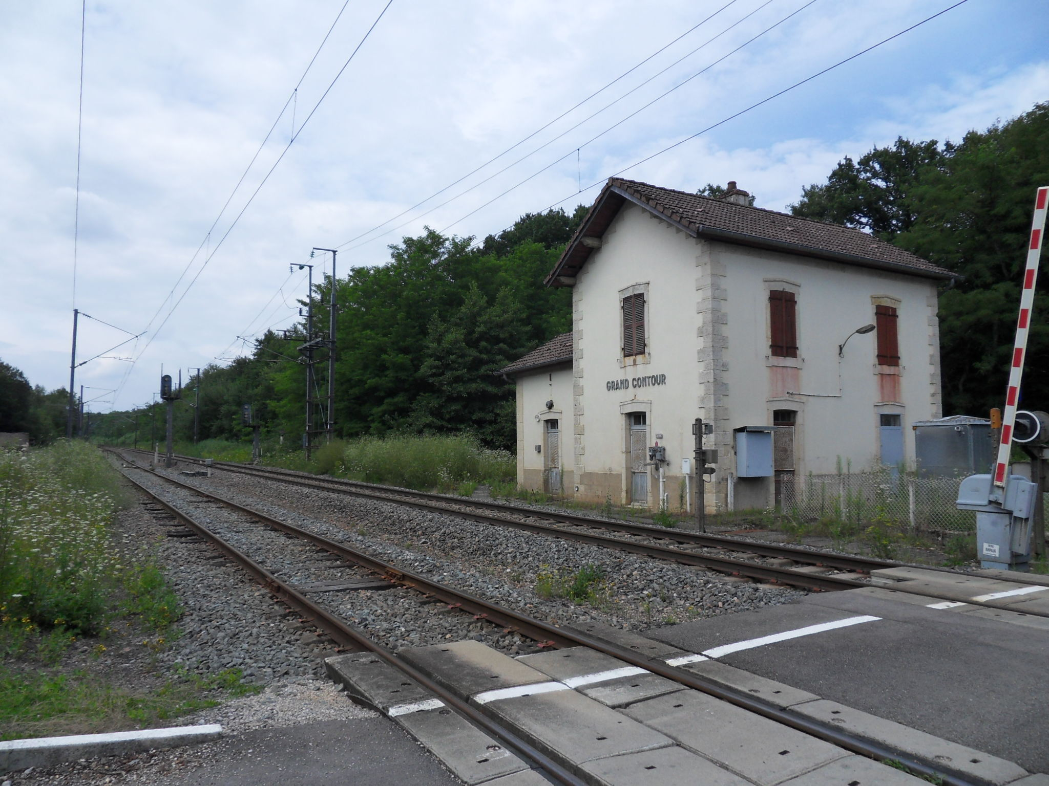 Grand-Contour (Jura) (department). Ligne de Dole à Vallorbe. Ligne Dijon - Vallorbe : Le point de croisement/dépassement de Grand-Contour dans la forêt de Chaux